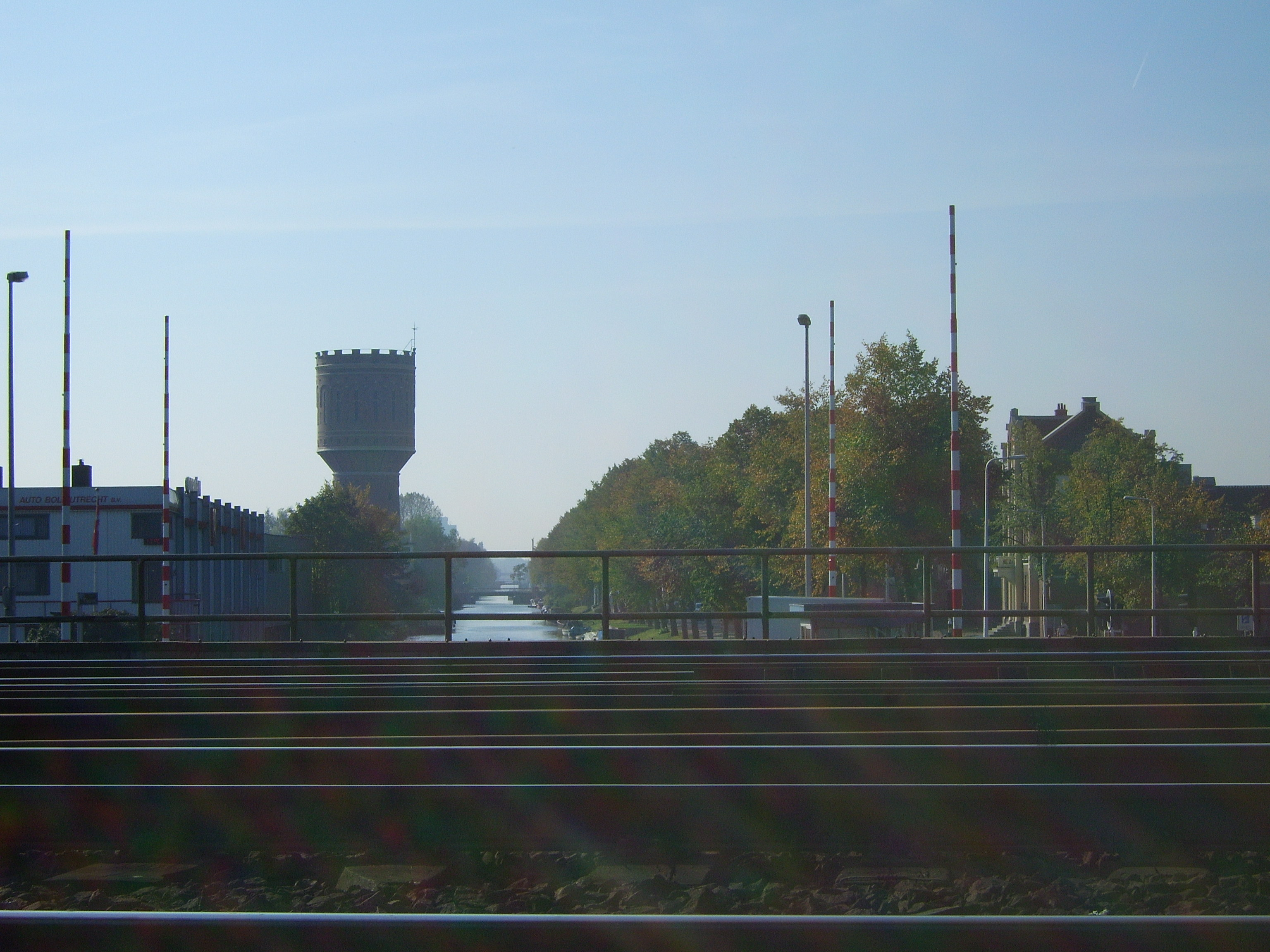 Jutphaseweg, Utrecht-Zuidwest, Nederland